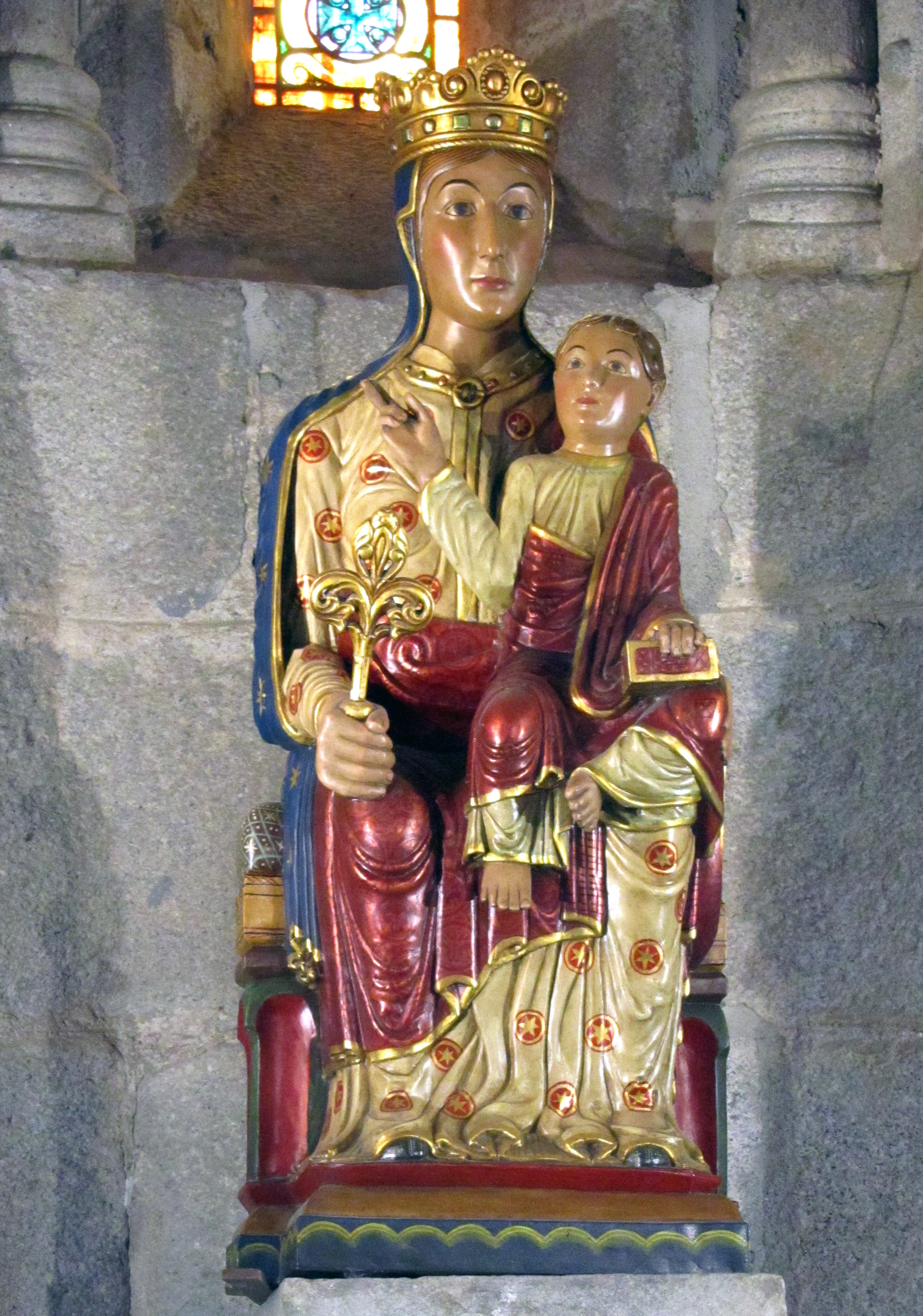 Nuestra Señora de Urgel, imagen expuesta en la catedral de la Seu de Urgel. Cataluña. Spain